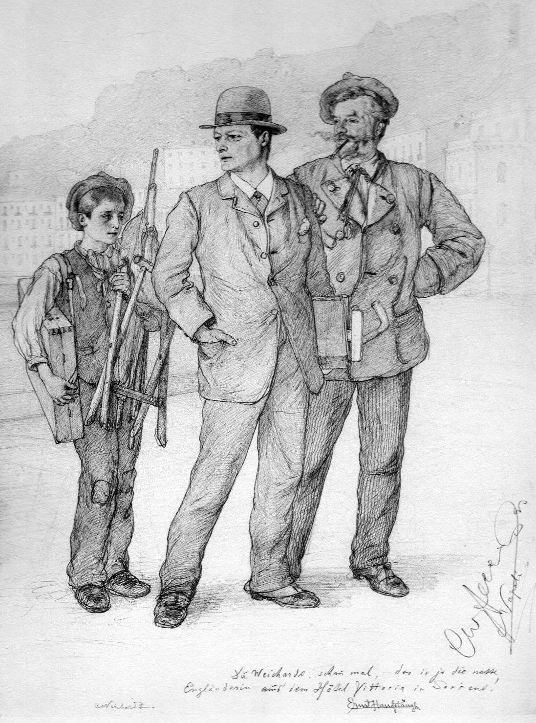 In der Mitte der deutsche Architekt Karl (=Carl) Weichardt, rechts Ernst Hanfstängl